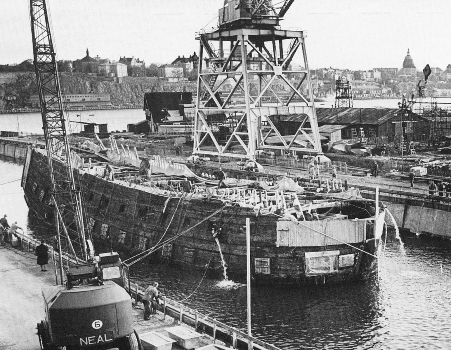 Regalskeppet "Vasa" på väg in i Beckholmens torrdocka